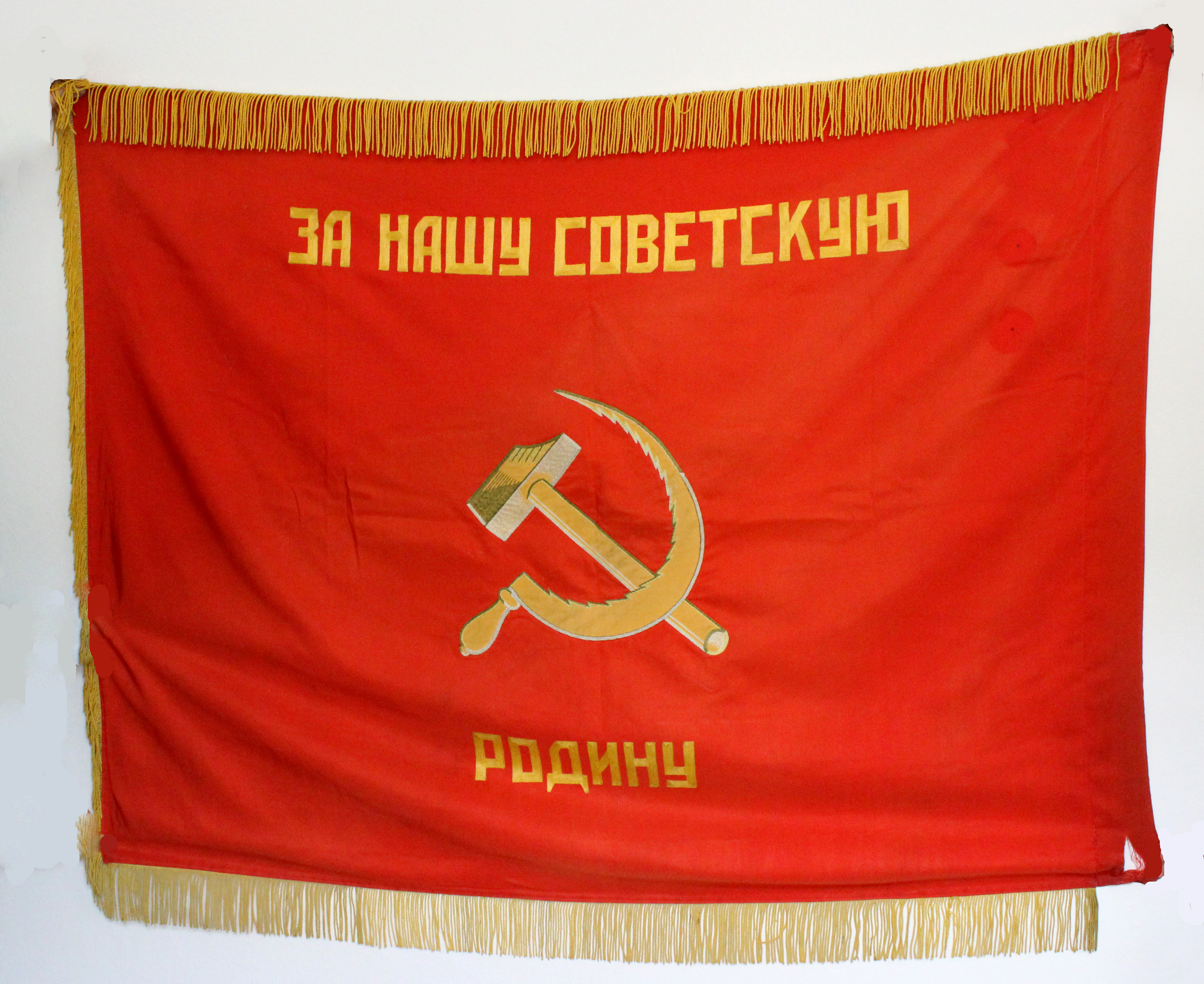 Знамя 120-го гвардейского мотострелкового полка. Реверс